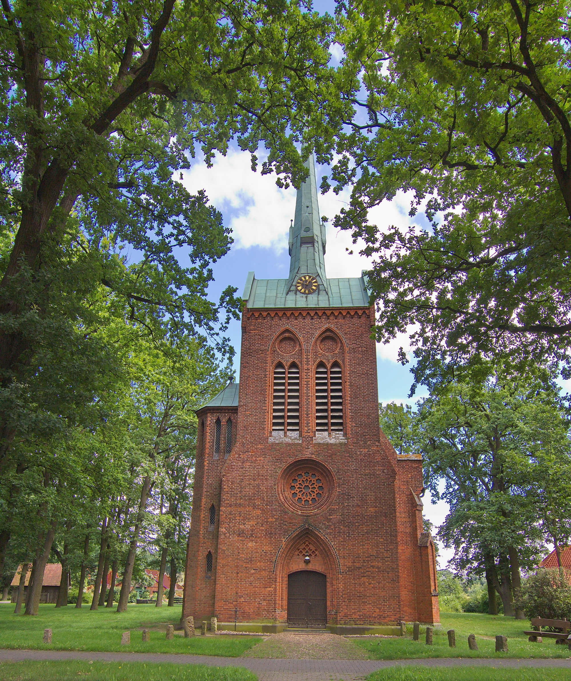 Die alte Kirche „Zum heiligen Kreuz“, ein gotischer Backsteinbau, stammt aus dem Jahre 1296 und wurde in den 1990ern umfangreich restauriert